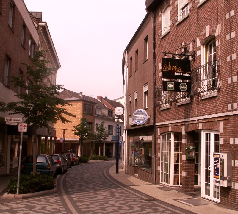 Heinsberger Land, Hochstraße Heinsberg